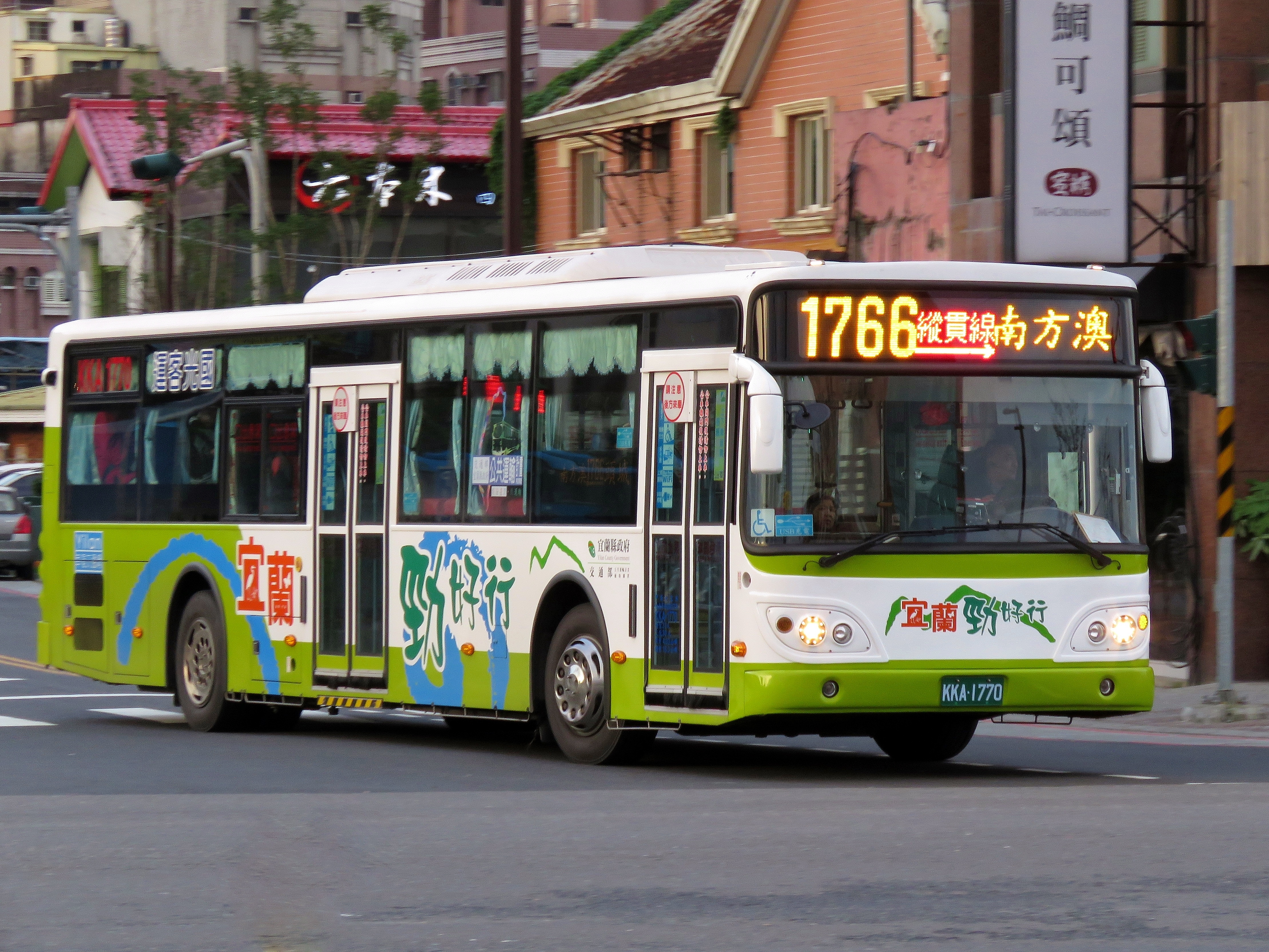 中文（台灣）: 2017(2017) DAEWOO BS120CN 1766路 頭城→南方澳